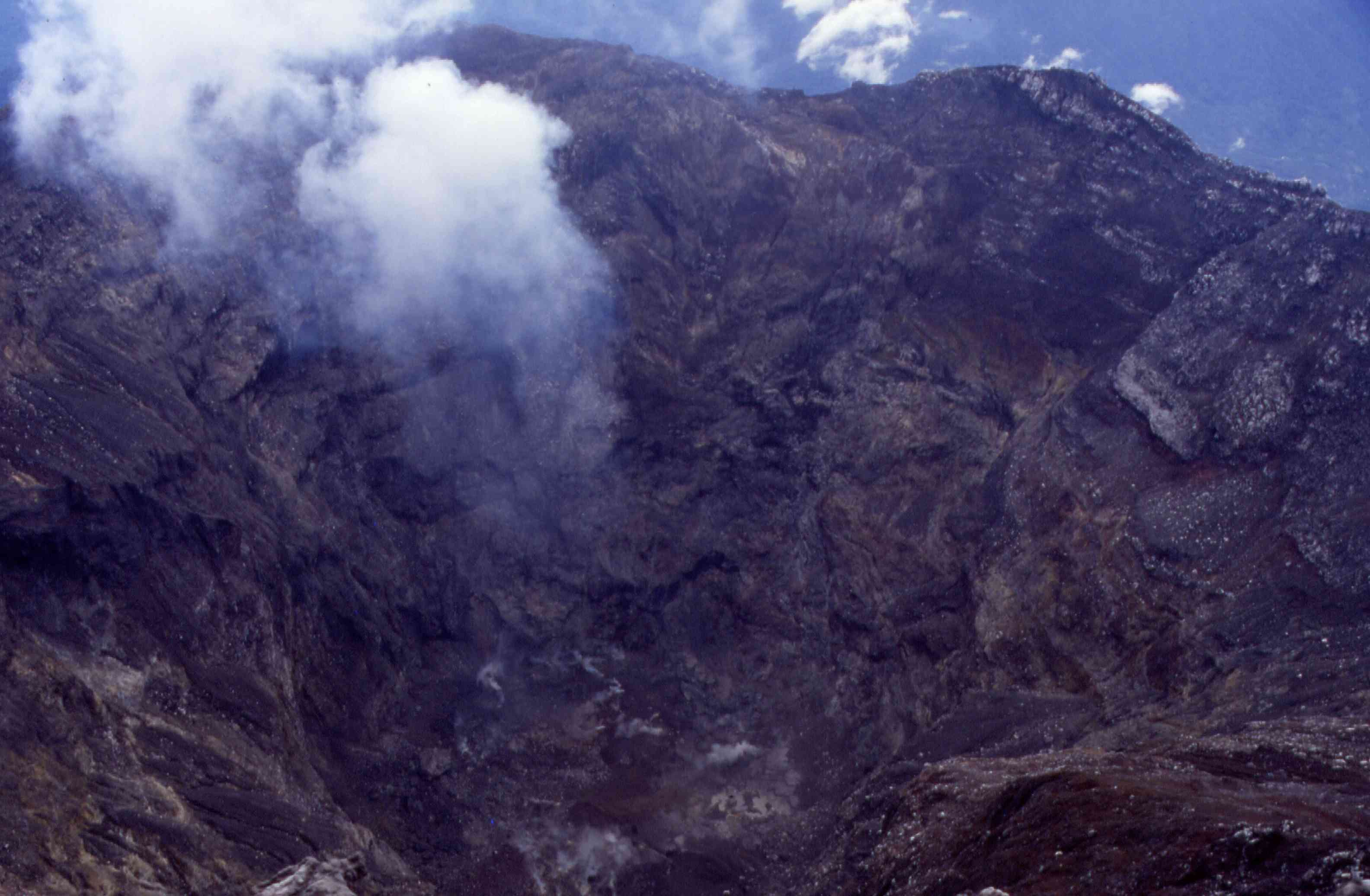 Blick in den Krater des Kerinchi